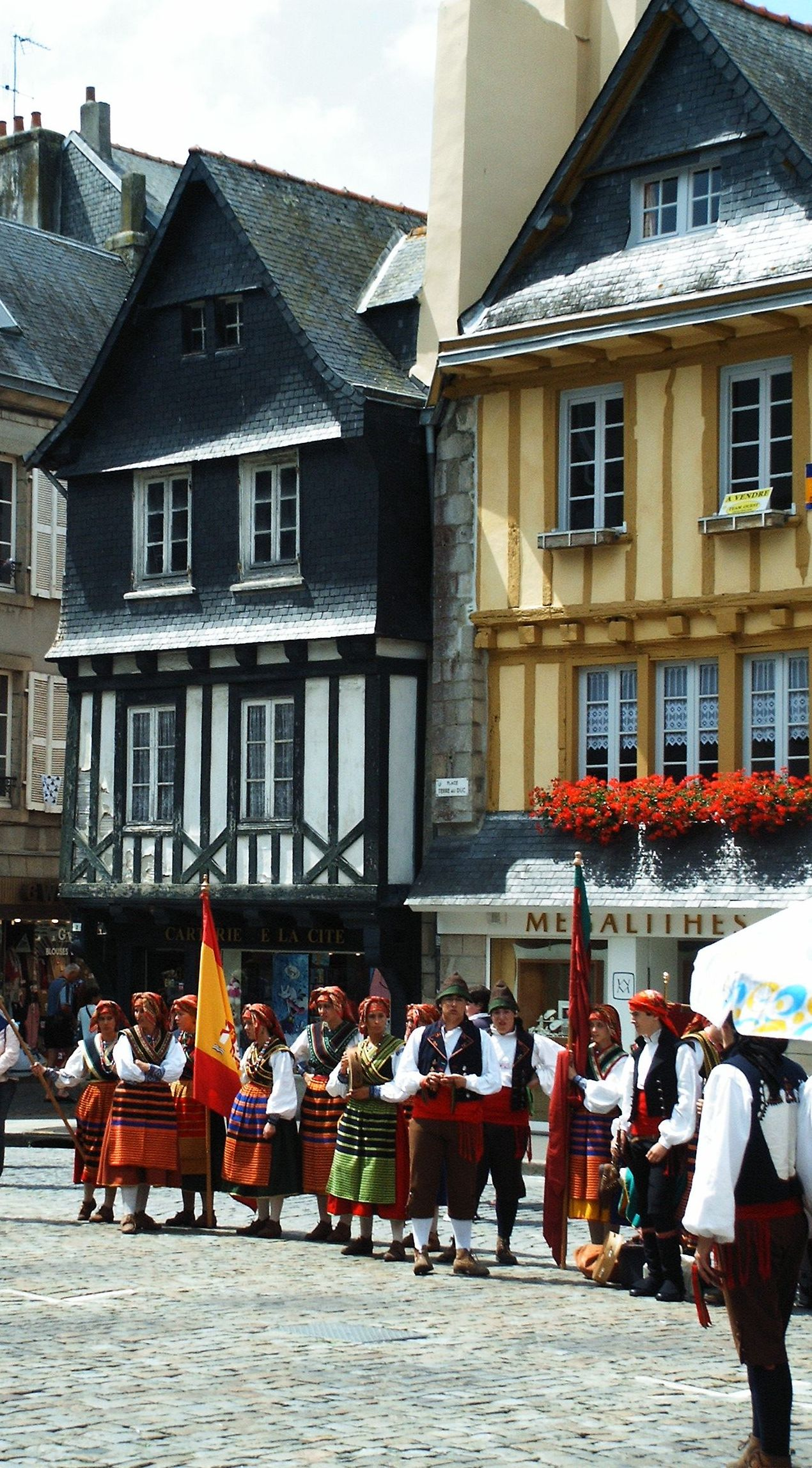 Quimper : Altstadt beim Fest der Cornouaille